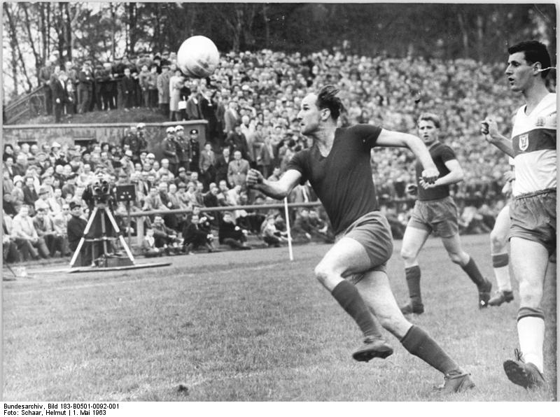 Zentralbild Schaar 1.5.1963 Motor Zwickau gewann FDGB-Pokal Am 1.5.1963 gewann die Fußball-Oberligamannschaft Motor Zwickau das 12. Fußball-Finale um den FDGB-Pokal in Altenburg durch einen 3:0-Erfolg über Chemie Zeitz. UBz: Der Zwickauer Spieler Gruner (links) ist an Kohl (Zeitz) vorbei und spielt das Leder in den Zeitzer Strafraum hinein.